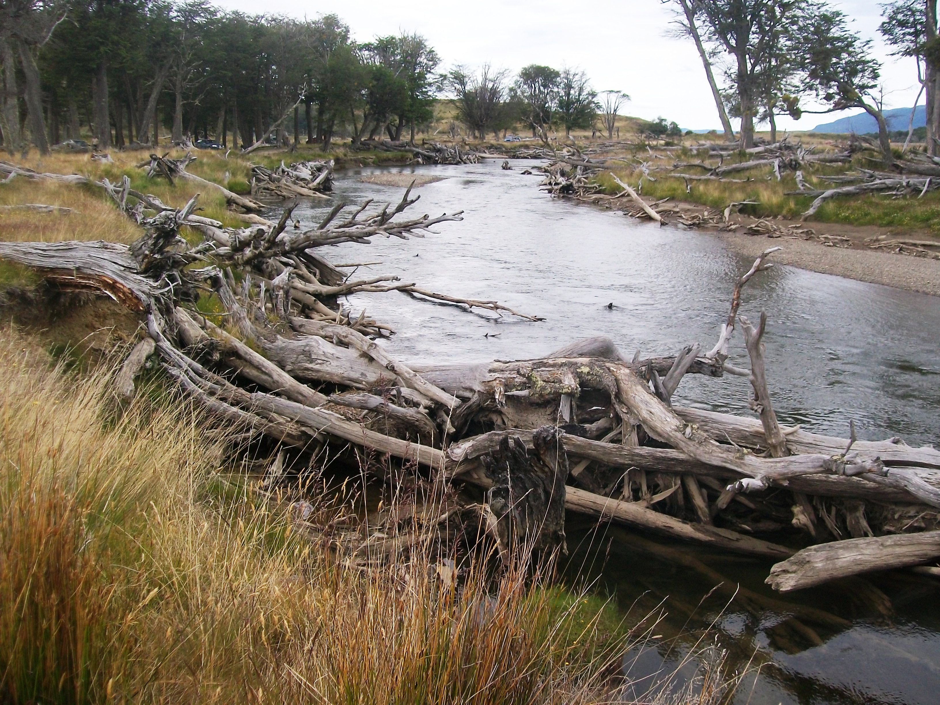 Rio Lasifashaj en su cruce con la ruta J en Tierra del Fuego, Argentina